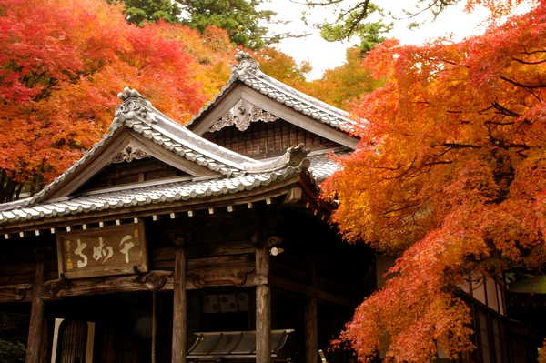 雷山千如寺 大悲王院 大楓